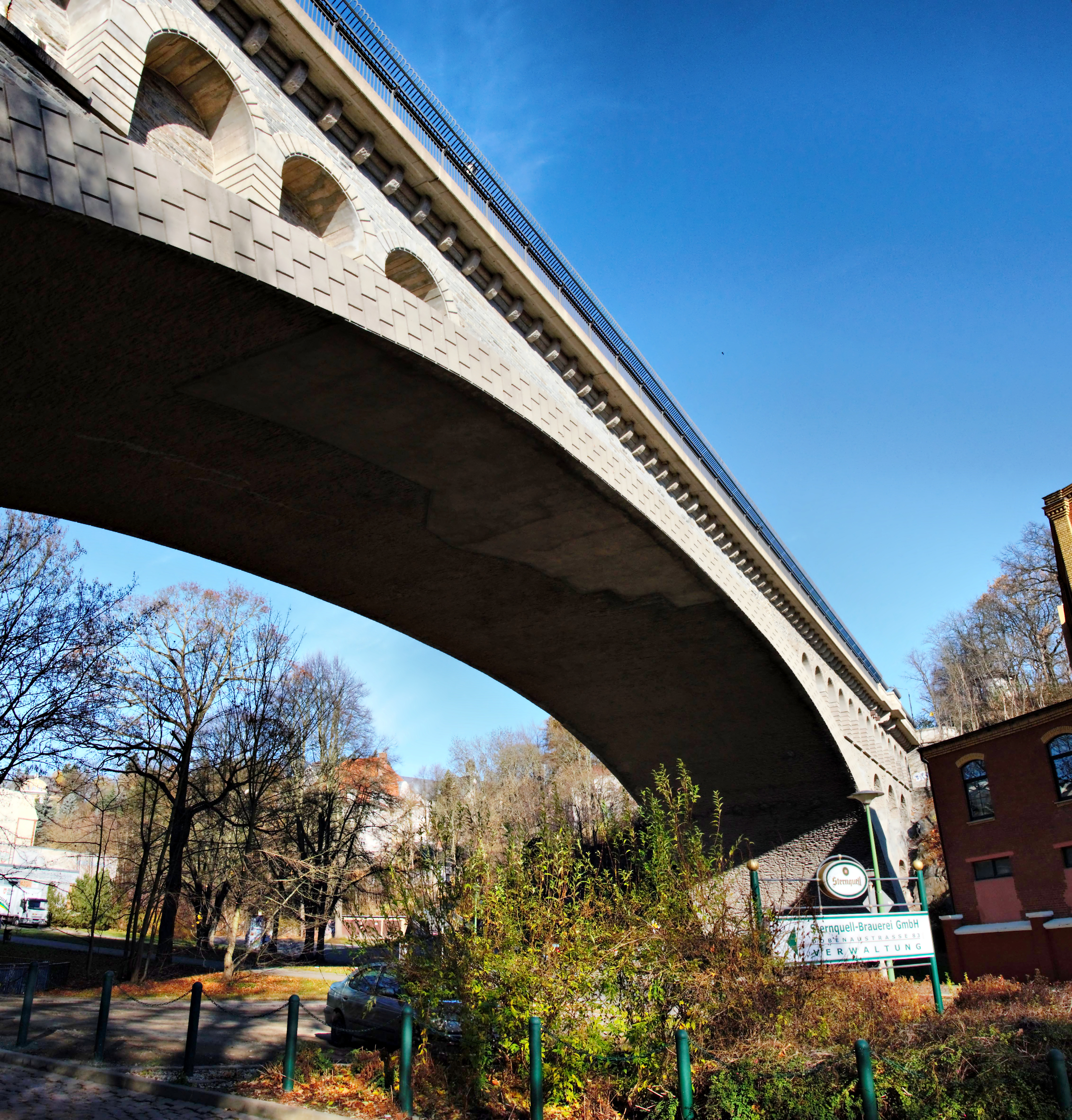 Die Friedensbrücke in Plauen